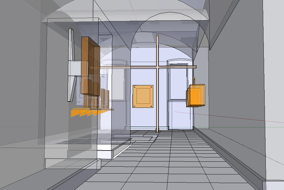 ricostruzione 3D della Sala V